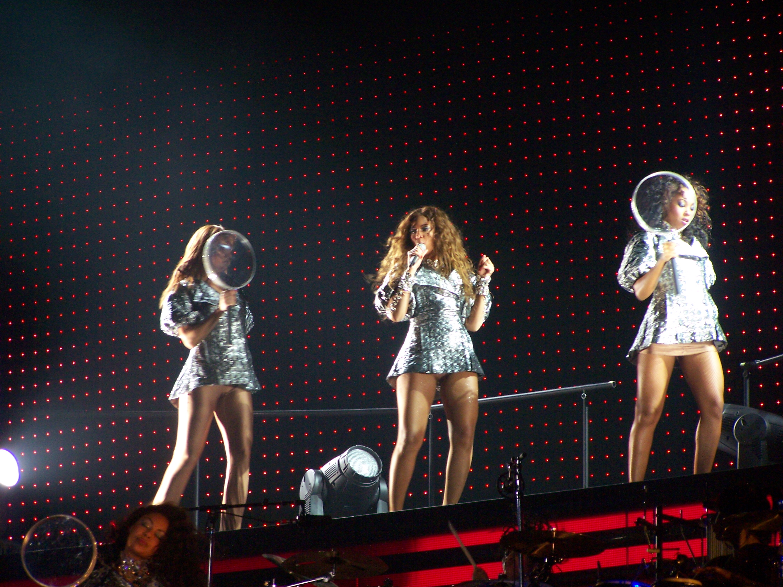 Beyoncé - Concert in 2007